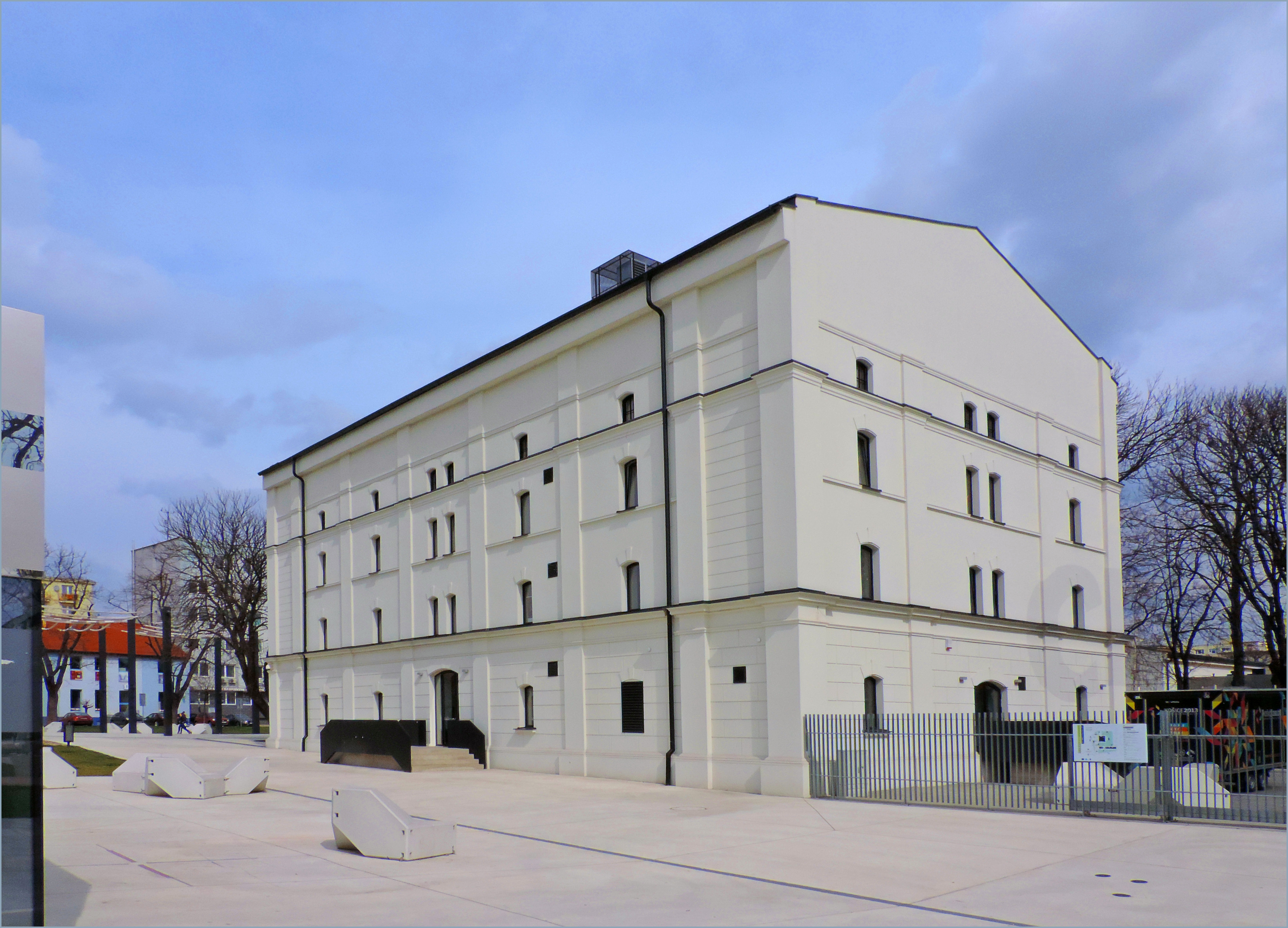 Kasárne/Kulturpark